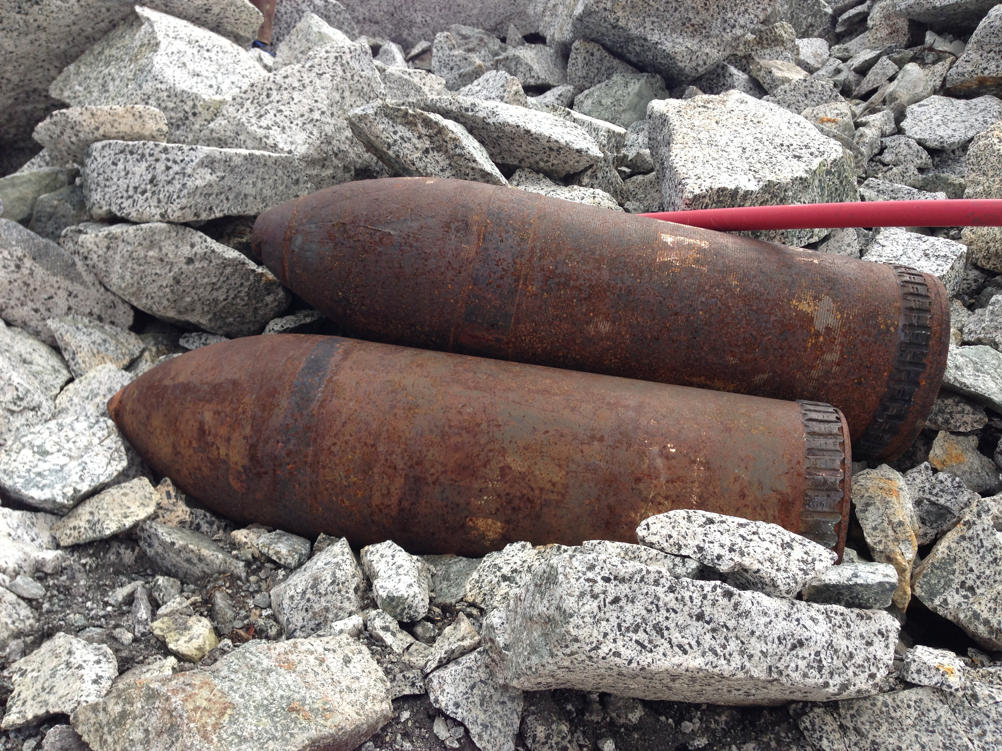 Due bombe italiane emergono dal Ghiacciaio